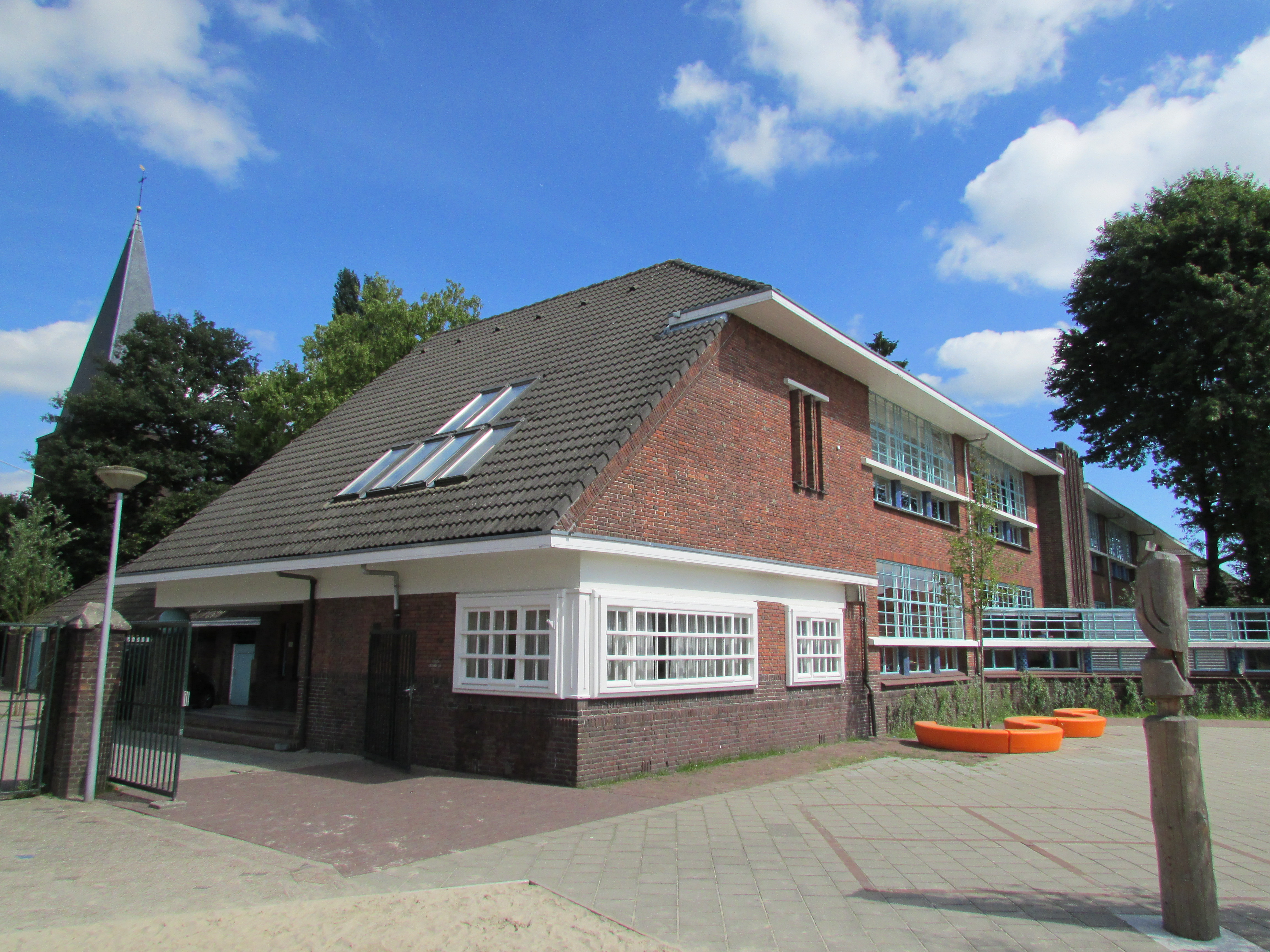 Cornelis Drebbelstraat 64 Hilversum baisschool De Wilge. Gemeentelijk monument.